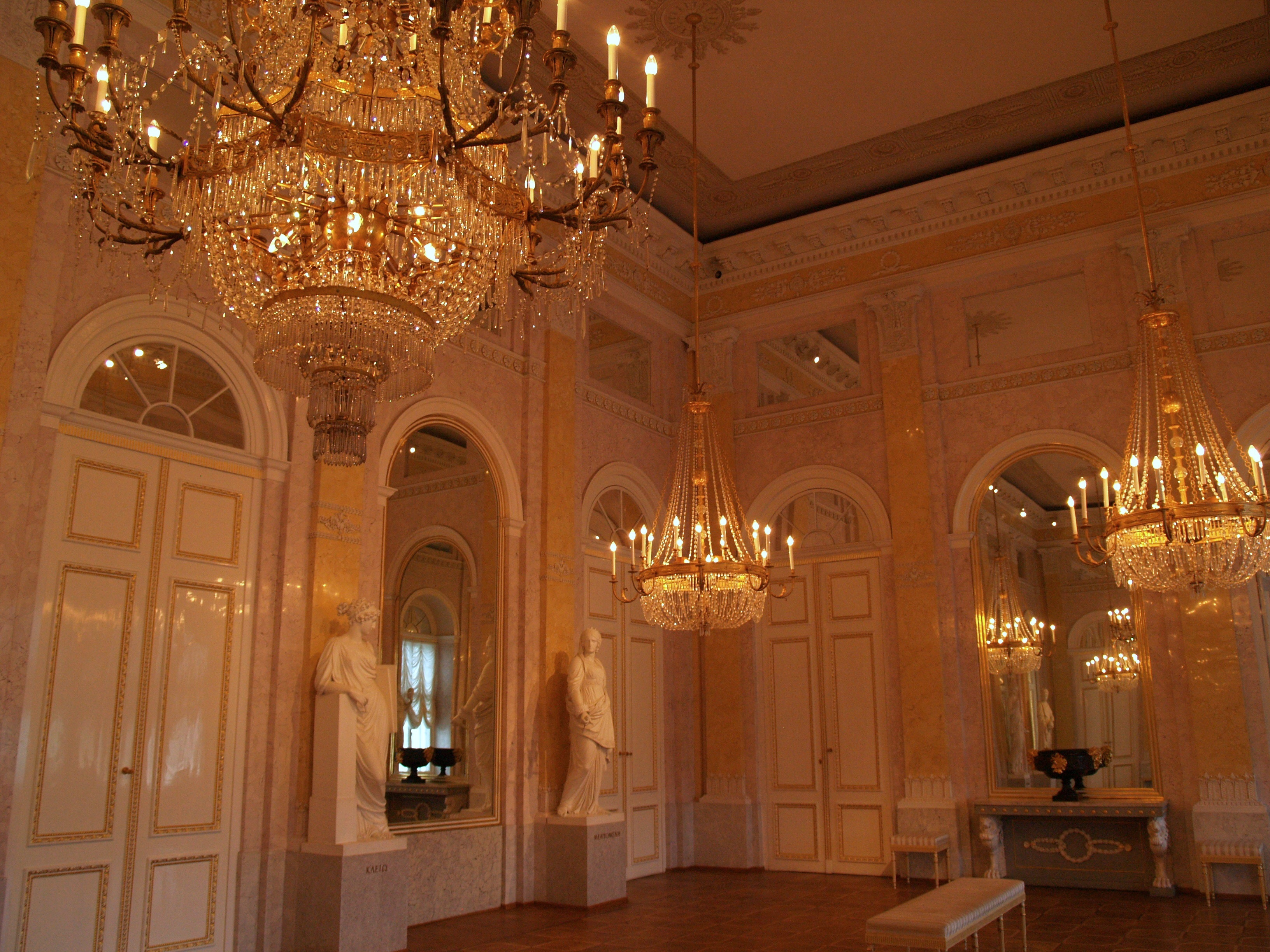 Viena. Albertina, sala de las Musas.